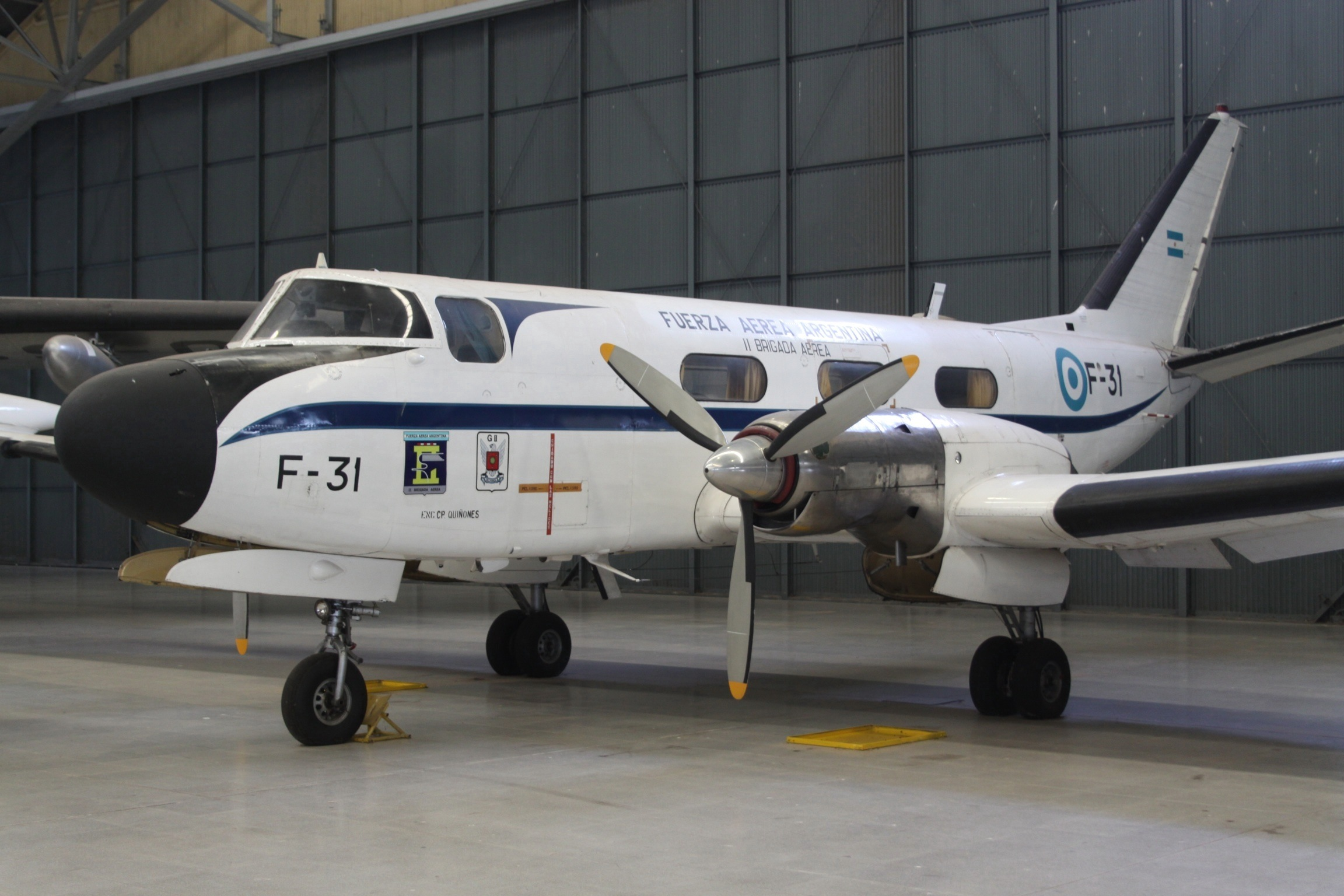 FMA IA 50 Guaraní II (F-31)